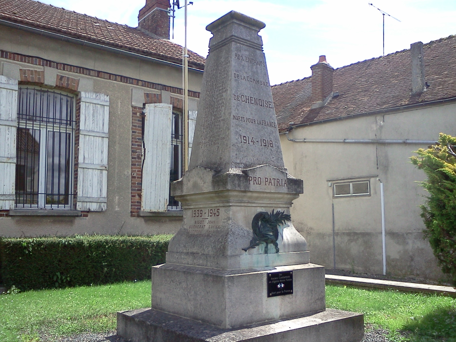 Monument commémoratif aux martyrs de deux guerres à Chenoise. (département de la Seine-et-Marne, région Île-de-France).